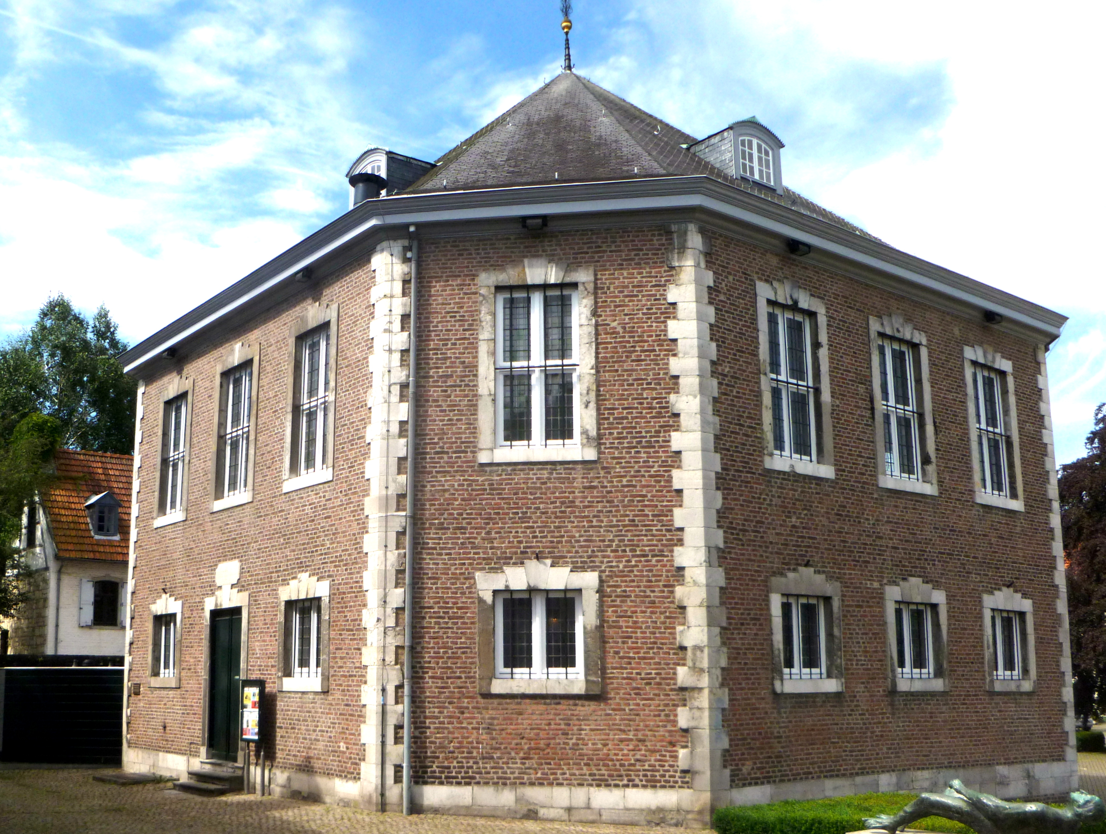 ehemalige lutherische Kirche de Kopermolen in Vaals, Seiteneingang